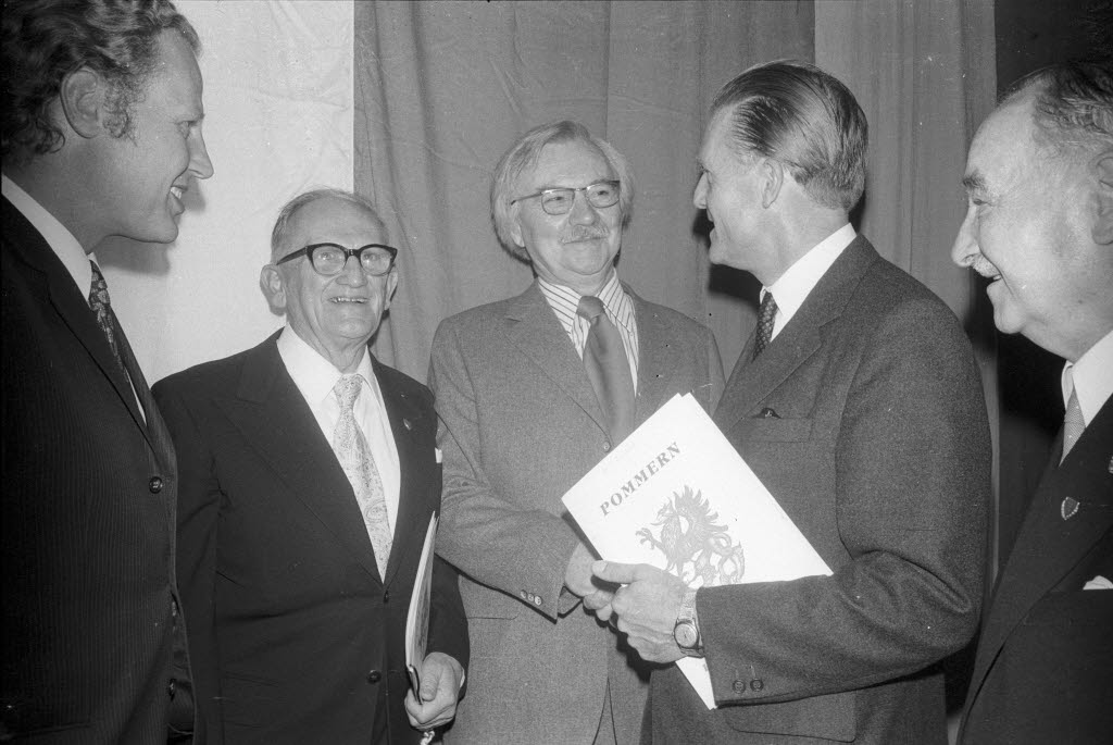 Der Kulturpreis geht an Prof. Dr. Dr. h.c. Johannes Paul und Prof. Bruno Müller-Linow. Der Sprecher der Pommerschen Landsmannschaft Philipp von Bismarck (4.v.l.) überreicht dem Maler Prof. Müller-Linow (3.v.l.) den Kulturpreis. Daneben steht der Historiker Professor Dr. Johannes Paul (2.v.l.) und Landessozialminister Karl Eduard Claussen (1.v.l.).